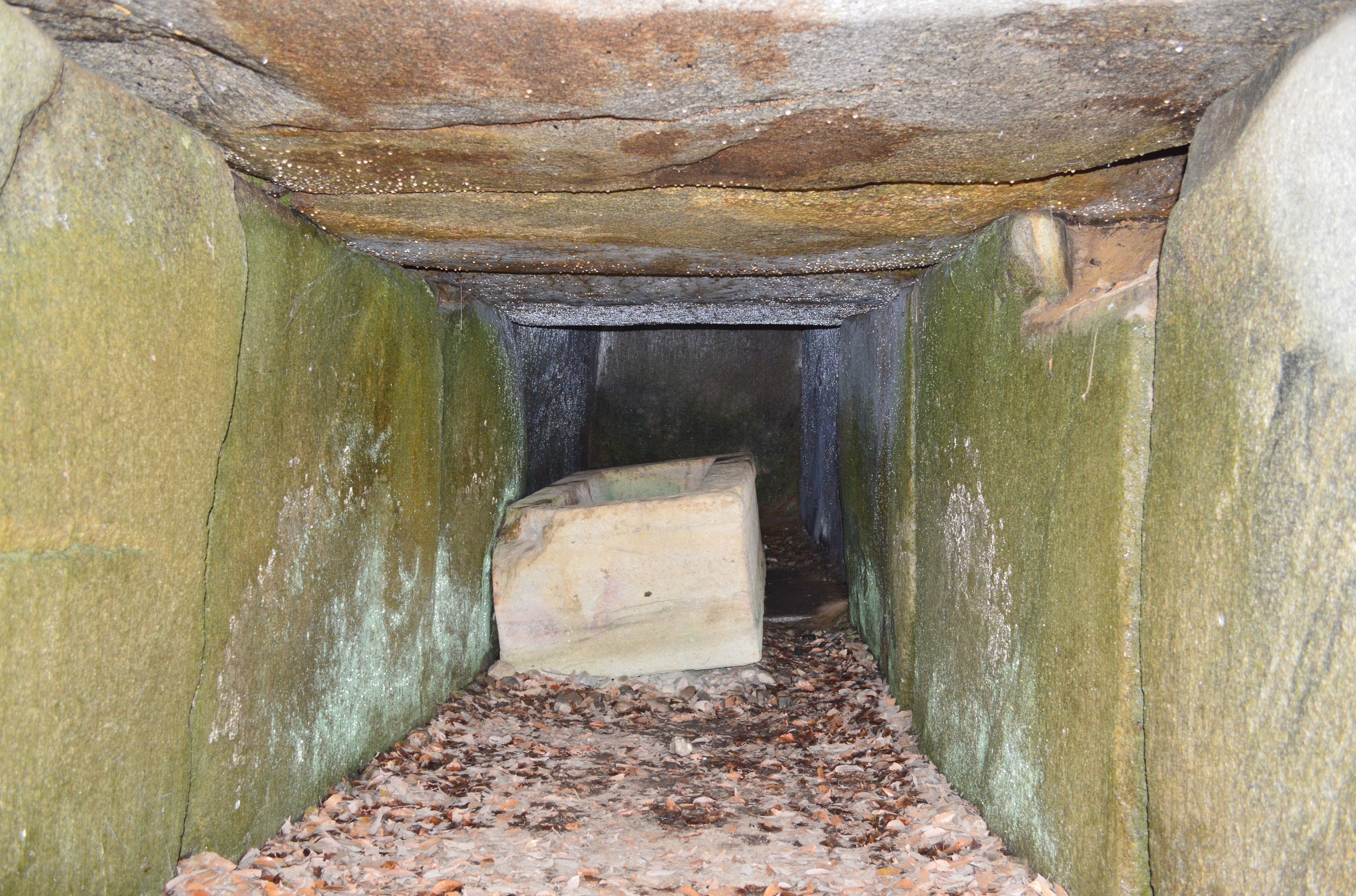 西宮古墳 石室羨道